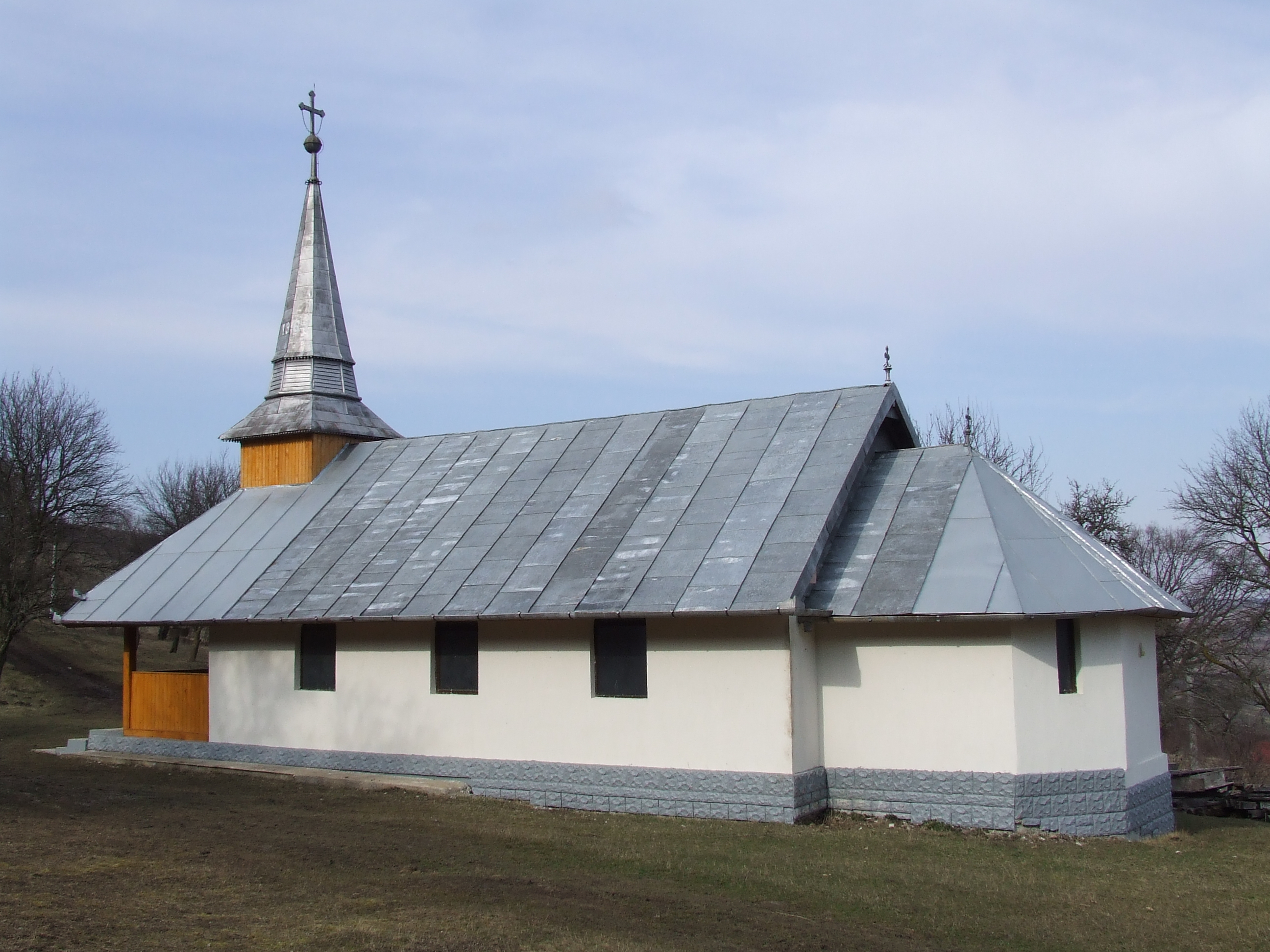 Biserica din Pădureni-Fânațe, județul Cluj.